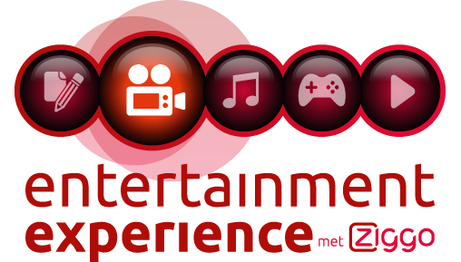 Logo Entertainment Express, created by Simone van der Hoeven, Webredactie Entertainment Experience, FCCE/NHP